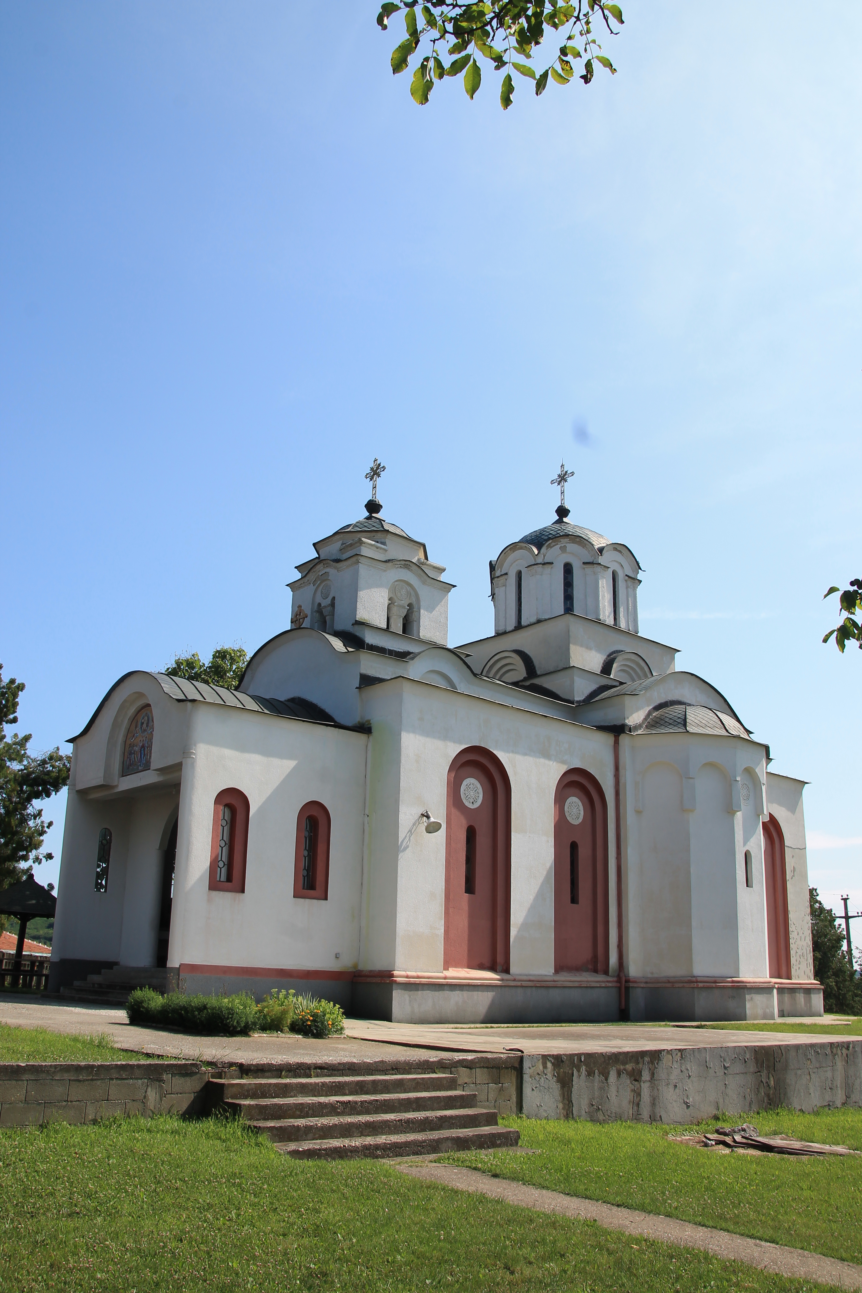 Crkva Vaznesenja Gospodnjeg (Sopot)